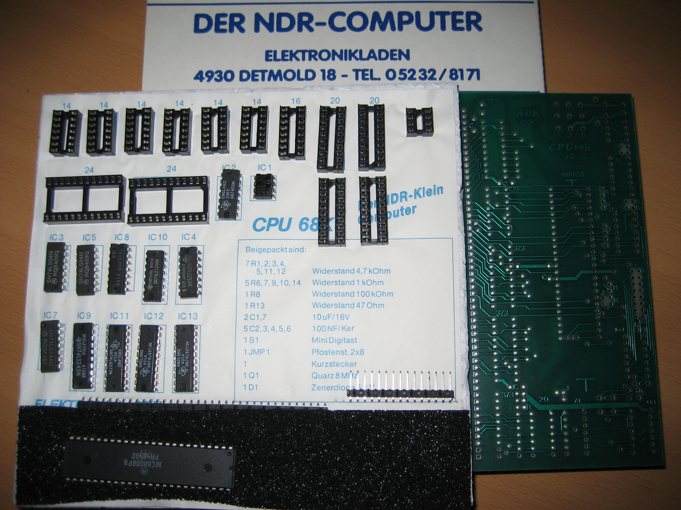 Bausatz für die Motorola 68000 CPU Karte des NDR-Klein Computers